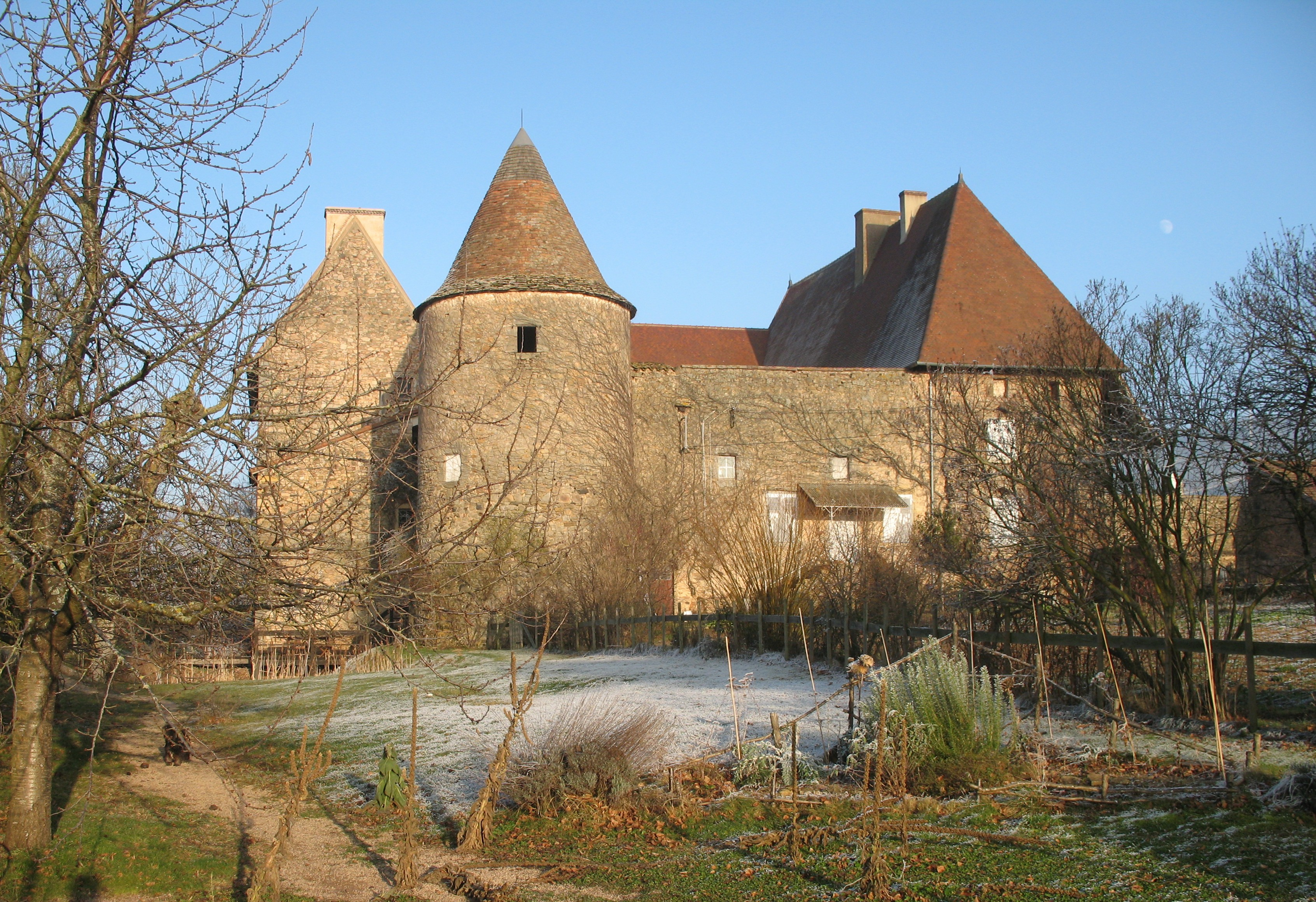 château de Corcelle - Bourgvilain (Saône-et-Loire)